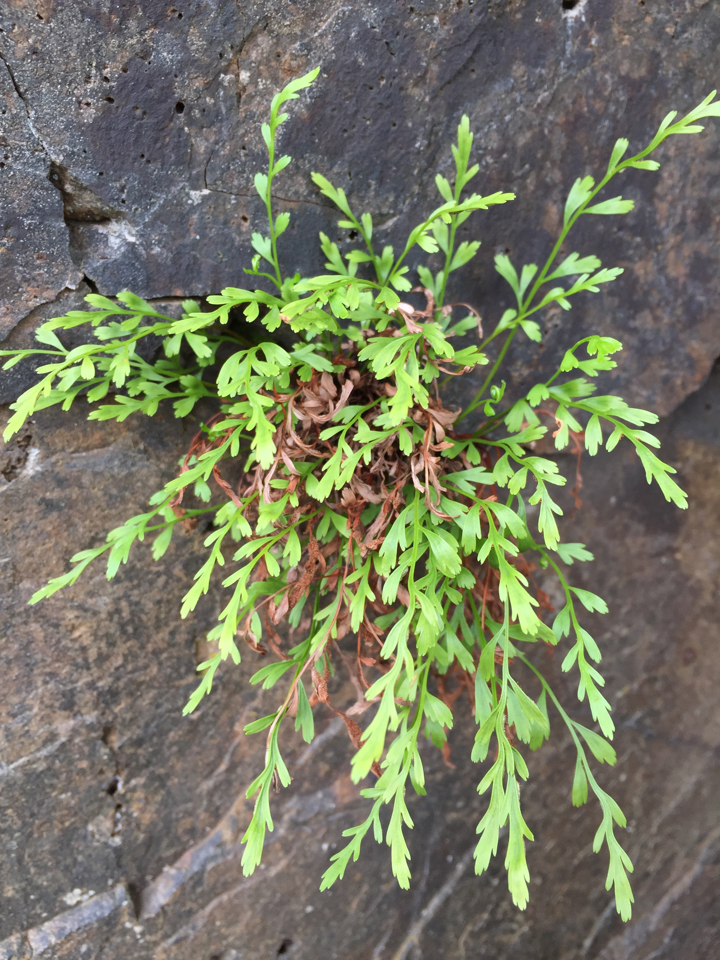 Fundort im östlichen Frankenwald